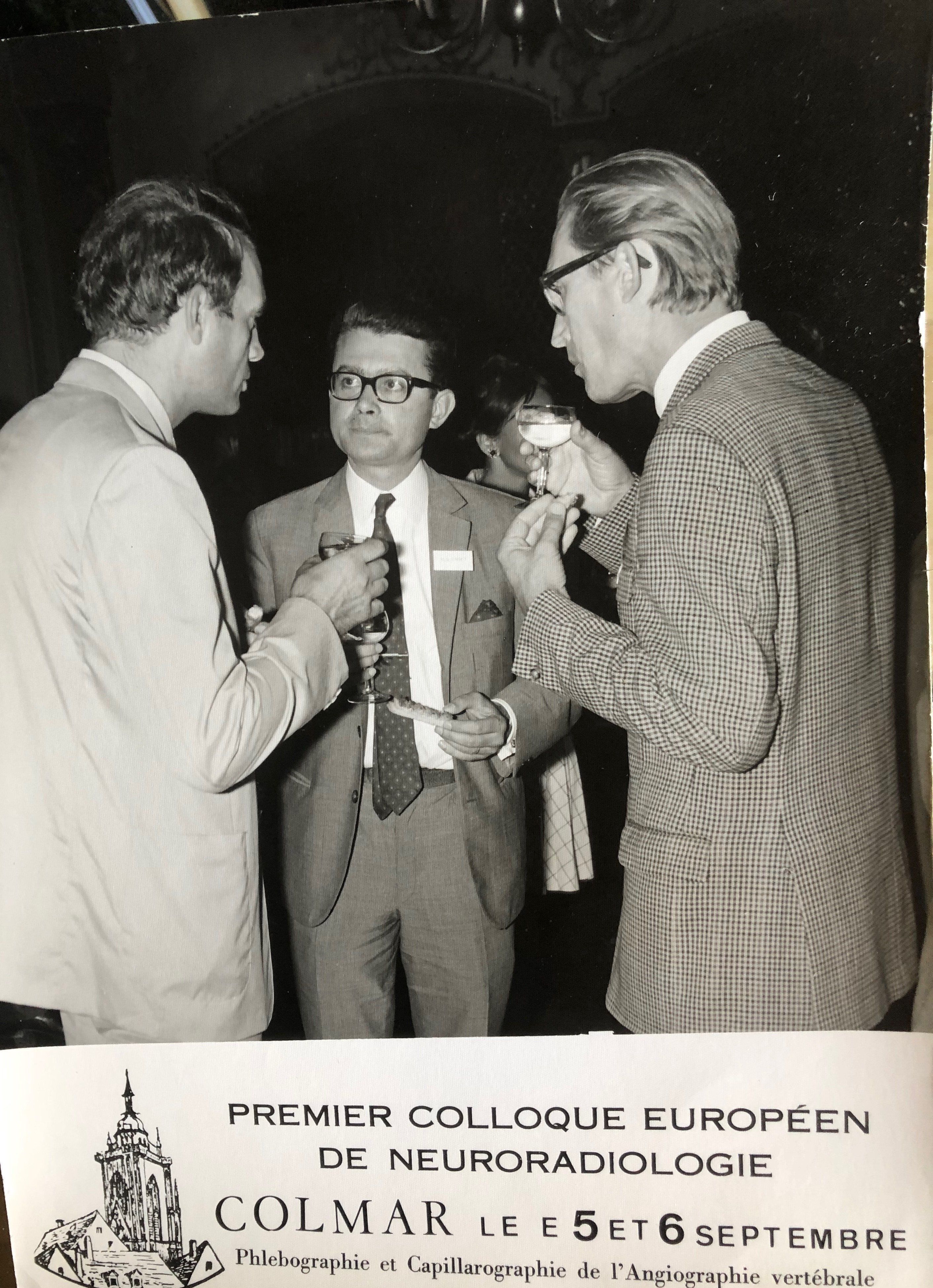 Rencontre avec Prof. Torgny Greitz de Stockolm (à droite) (Colmar 1969)